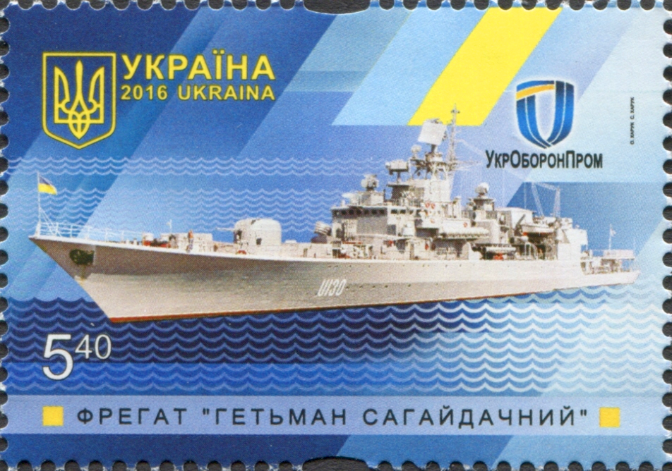 Марка України «Фрегат „Гетьман Сагайдачний“»